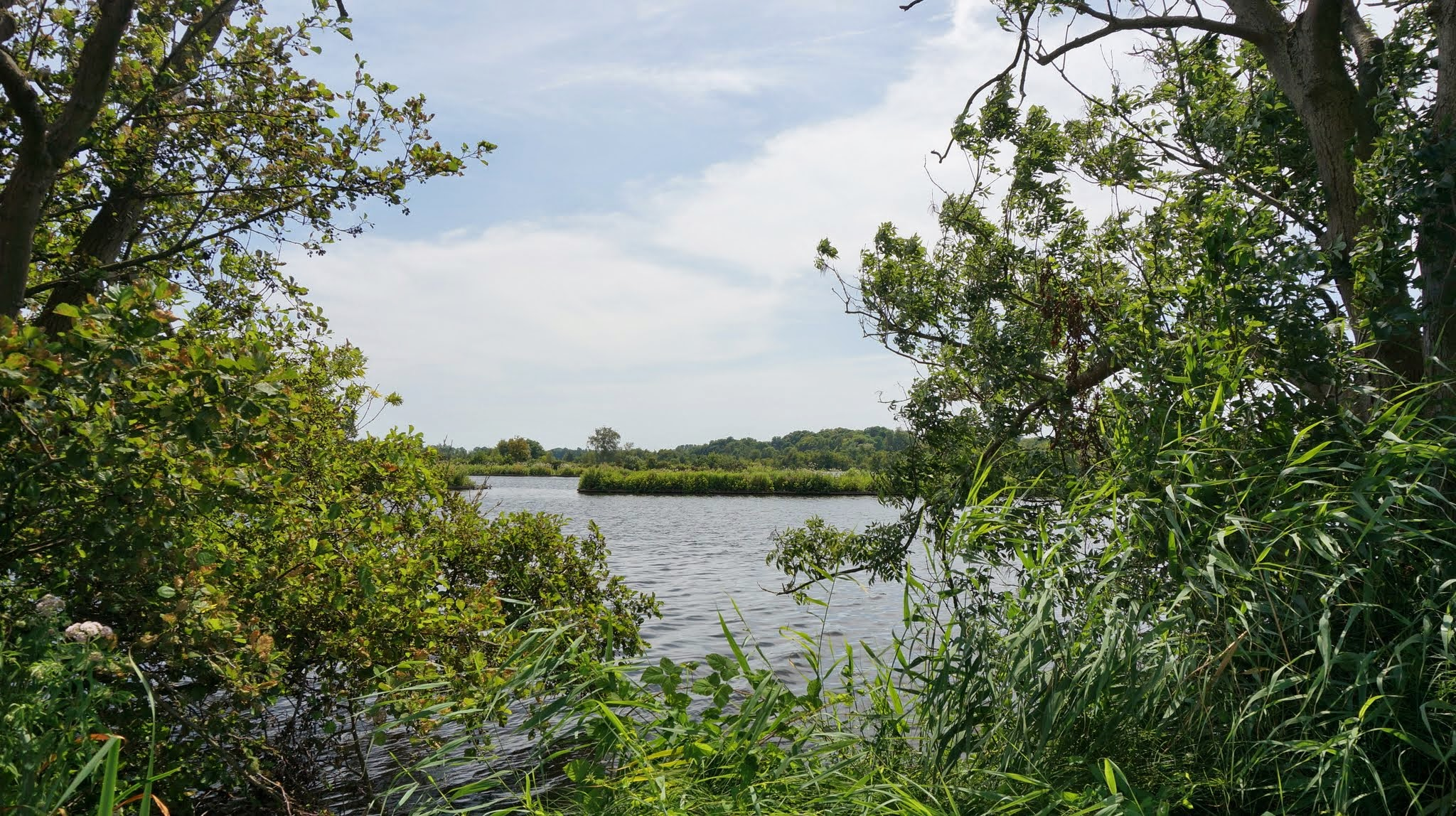 1231 Loosdrecht, Netherlands